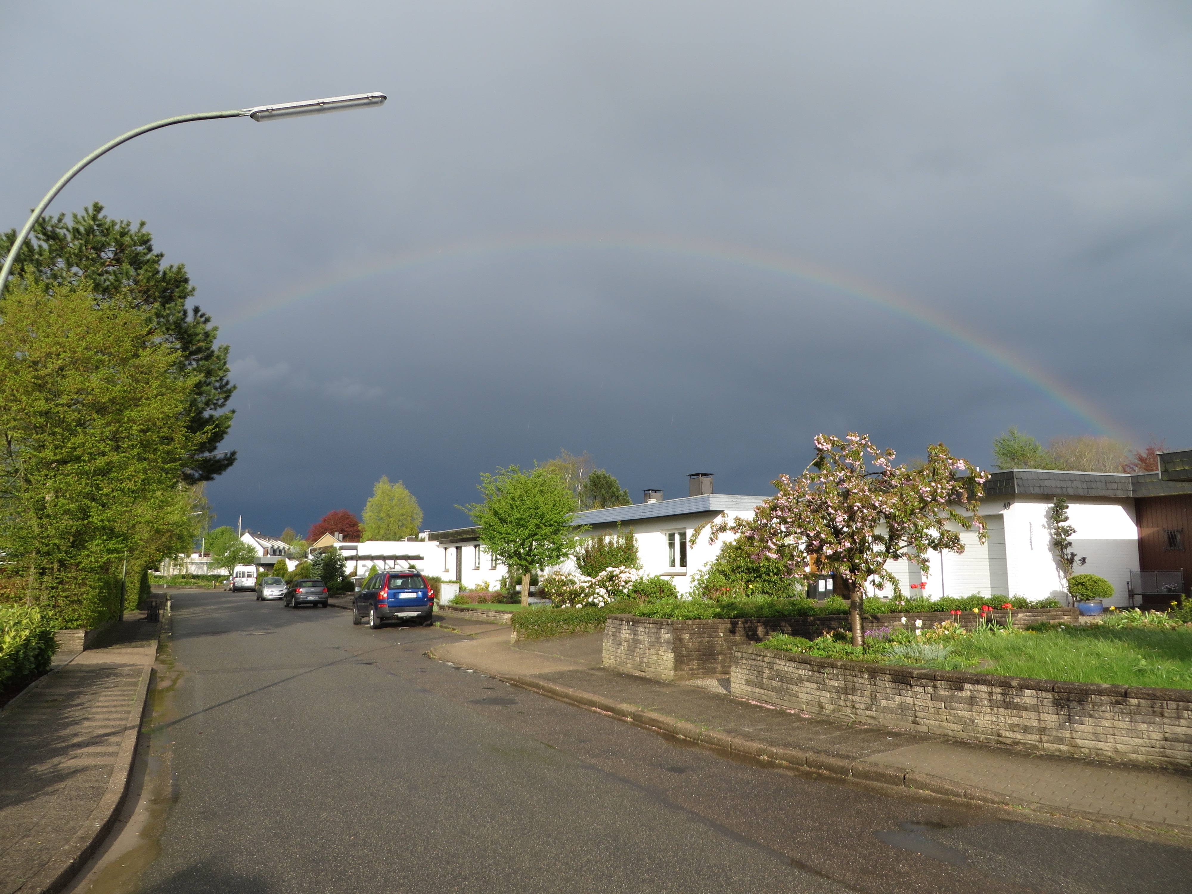 Großer Wacholderbogen mit Regenbogen (Flensburg-Mürwik), Bild 01